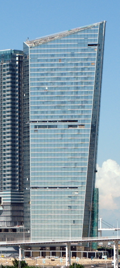 Mandarin Oriental Macau